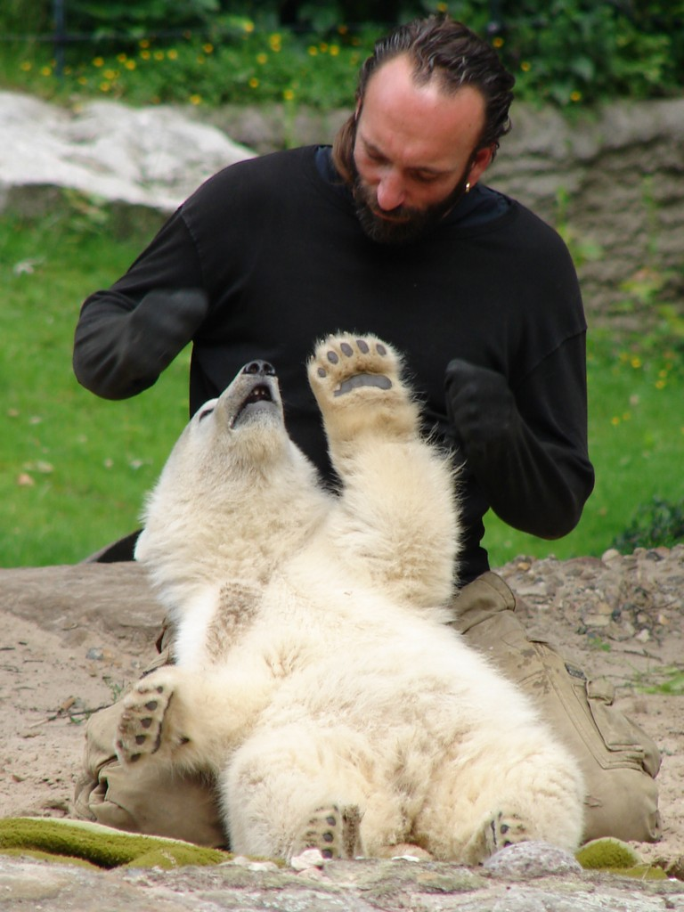 Eisbär Knut mit Pfleger Thomas Dörflein im Berliner Zoo am 31. Mai 2007